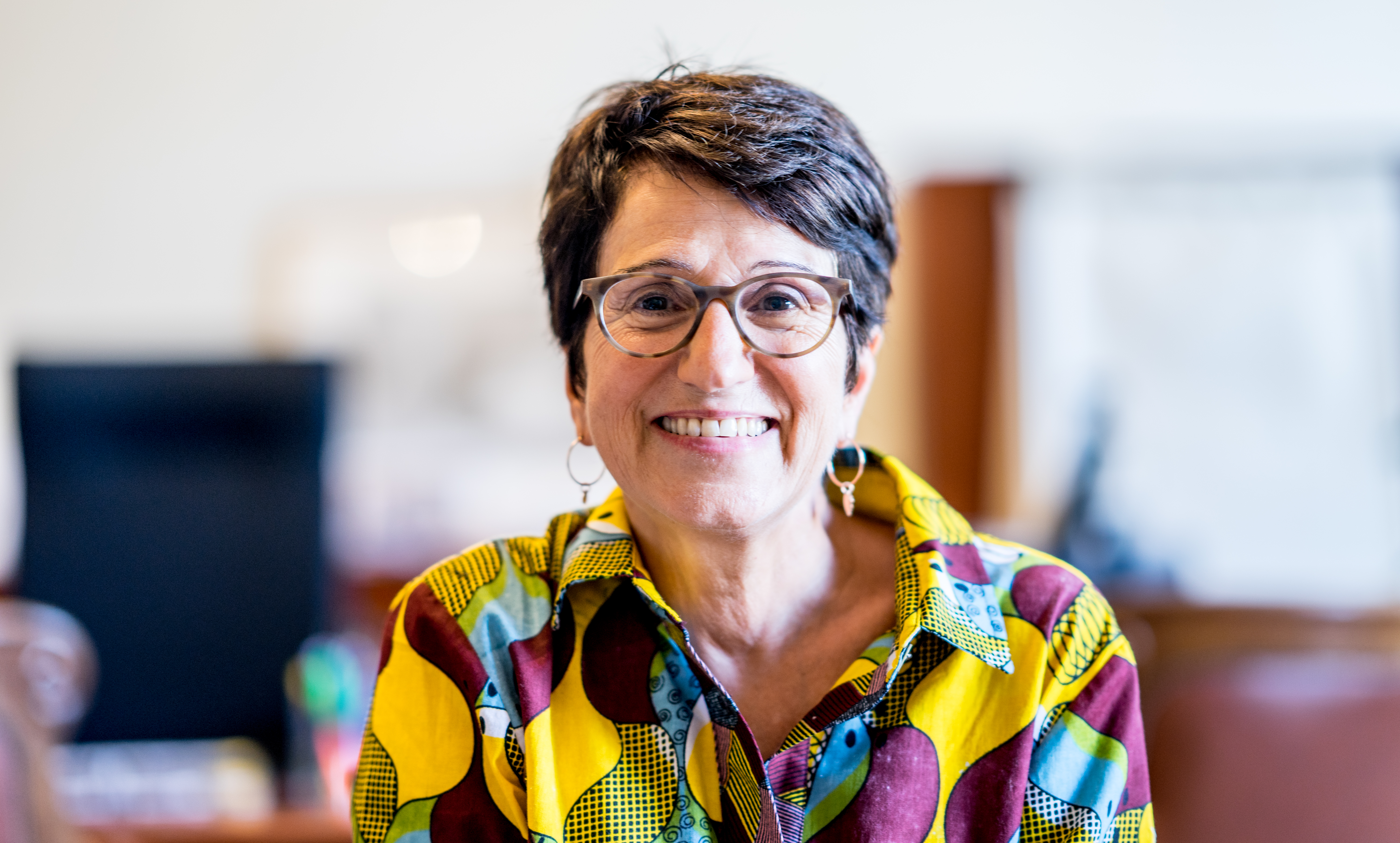 Dominique Versini